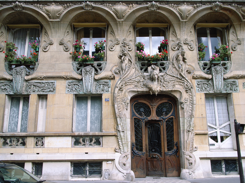 Immeuble Art Nouveau situé 29 avenue Rapp à Paris